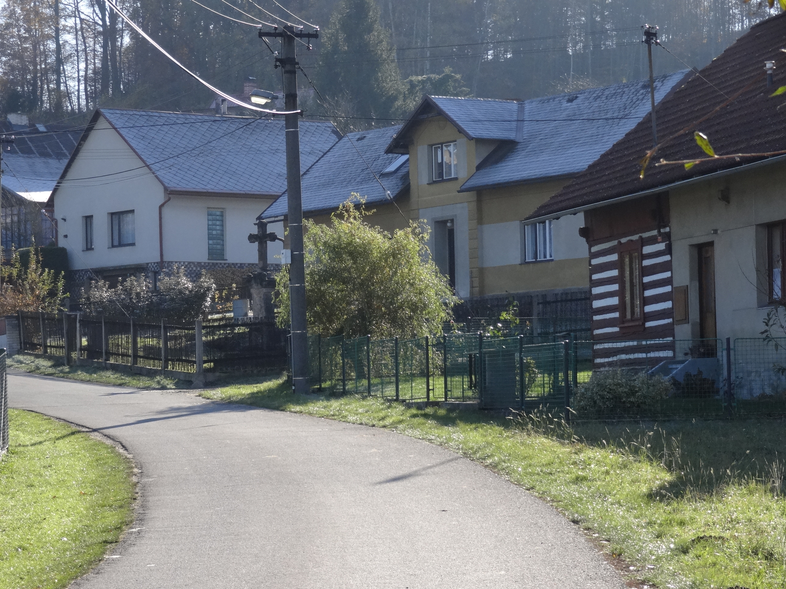 Krucifix, při čp. 12, Doubravice (Hrubá Skála).